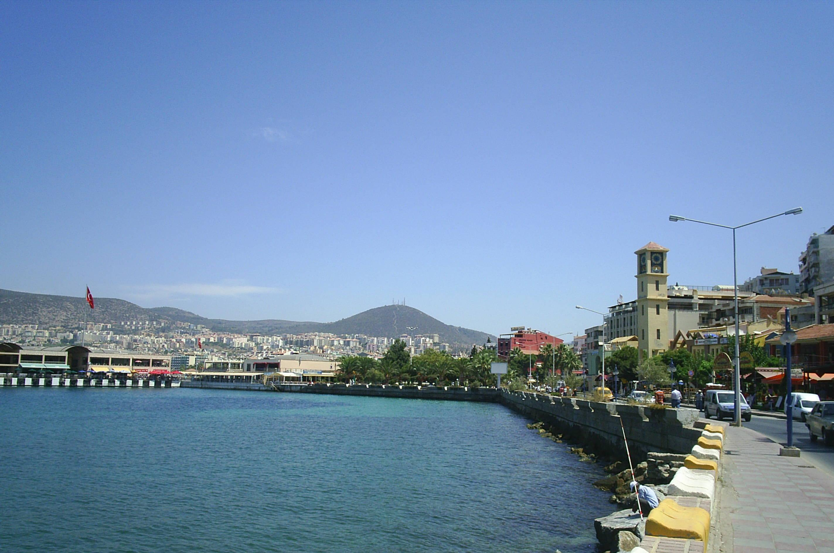 Kuşadası genel bir görüntü